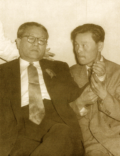 시공관에서 저격 직후의 장면 부통령